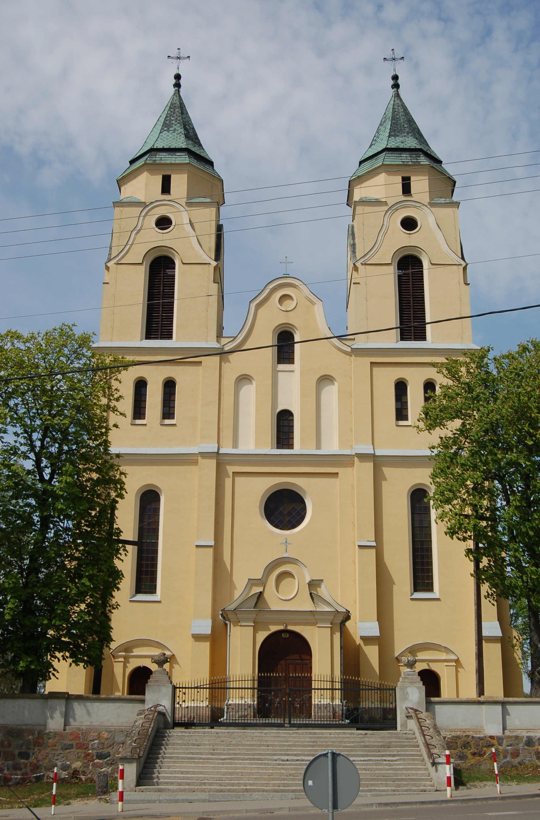 Korytnica, Polen